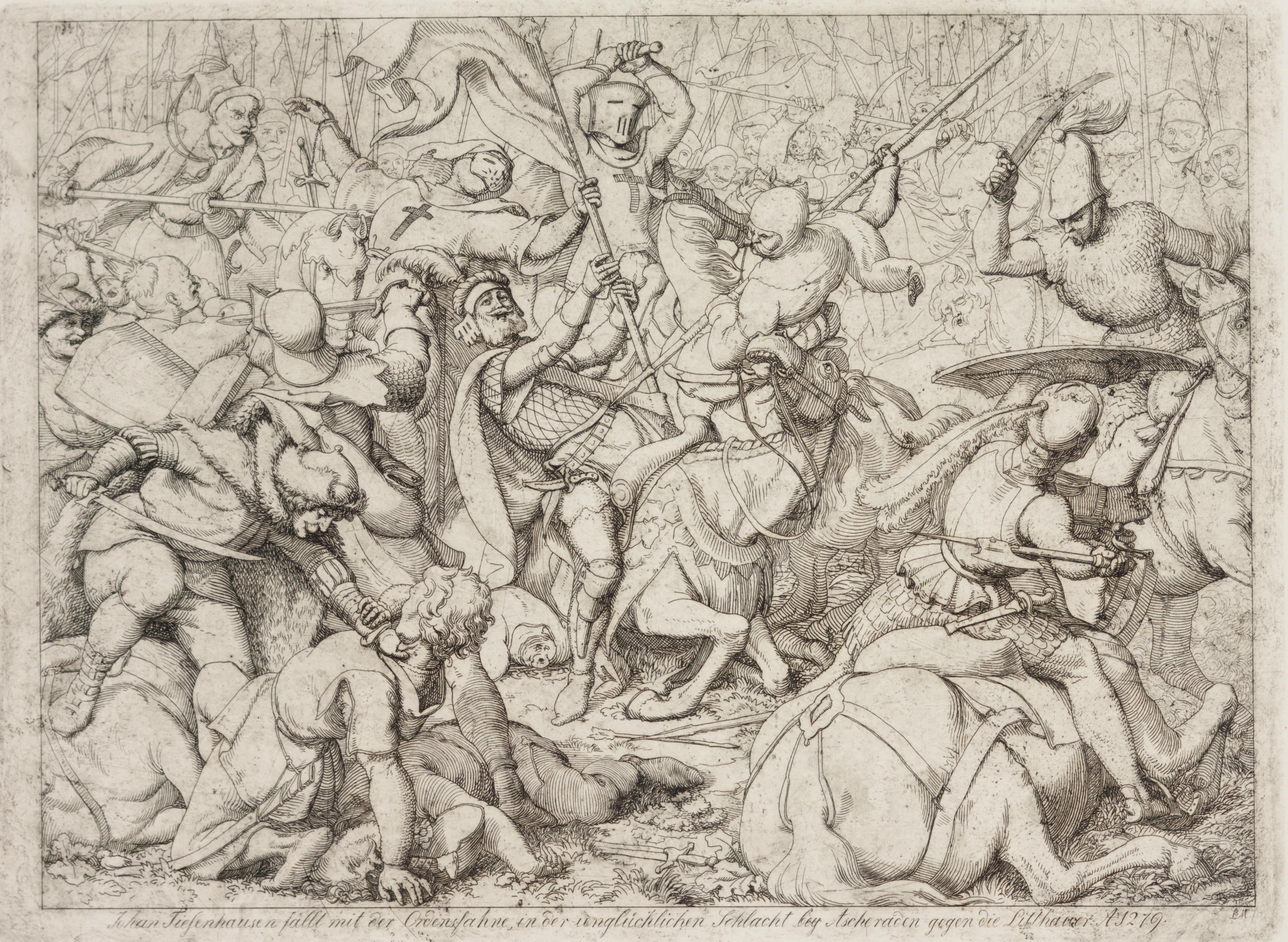 "Ordulipp käes langeb Johann von Tiesenhausen Aizkraukle lahingus leedulaste vastu" (1842). Ofort paberil. Kujutise kõrgus 23,0 cm ja laius 31,0 cm; lehe kõrgus 28,0 cm ja laius 38,7 cm. MUIS:TKM TR 15846 G 4515